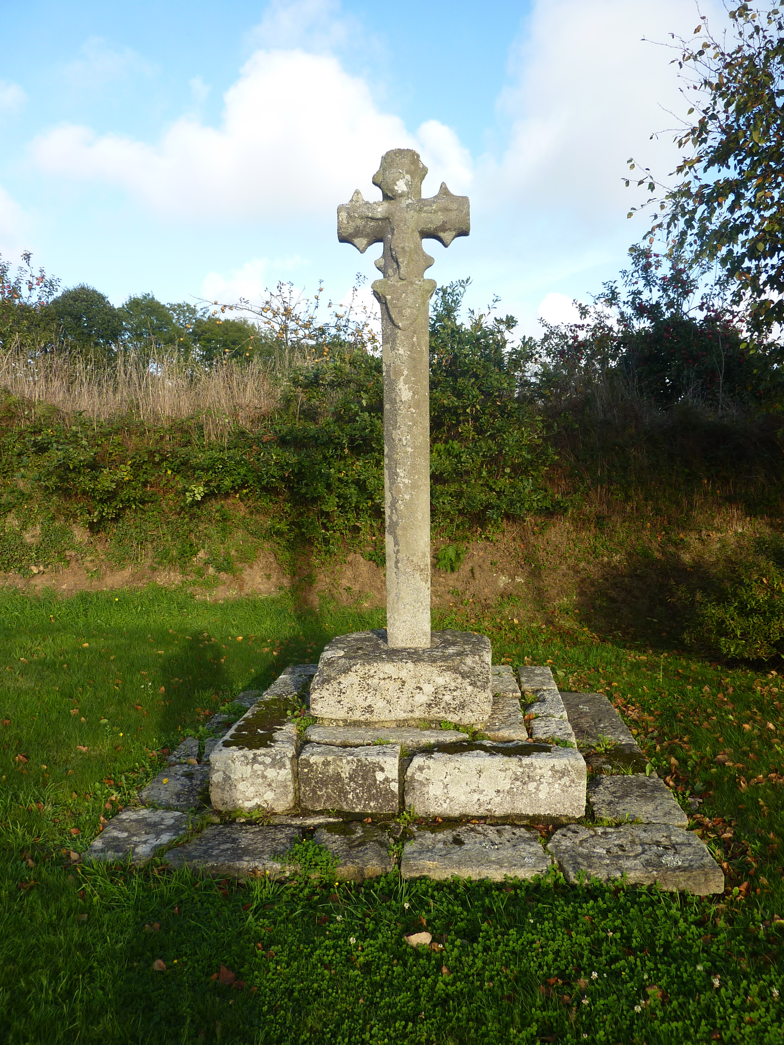 Croix de chemin du XIIIème siècle, avec crucifix en relief, située au carrefour du Drennec (carrefour CD 34 avec la route menant à Clohars-Fouesnant et à la pointe de Mousterlin) en Clohars-Fouesnant .